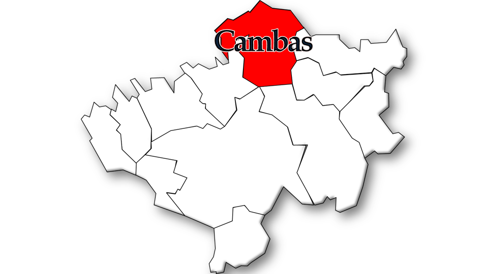 População